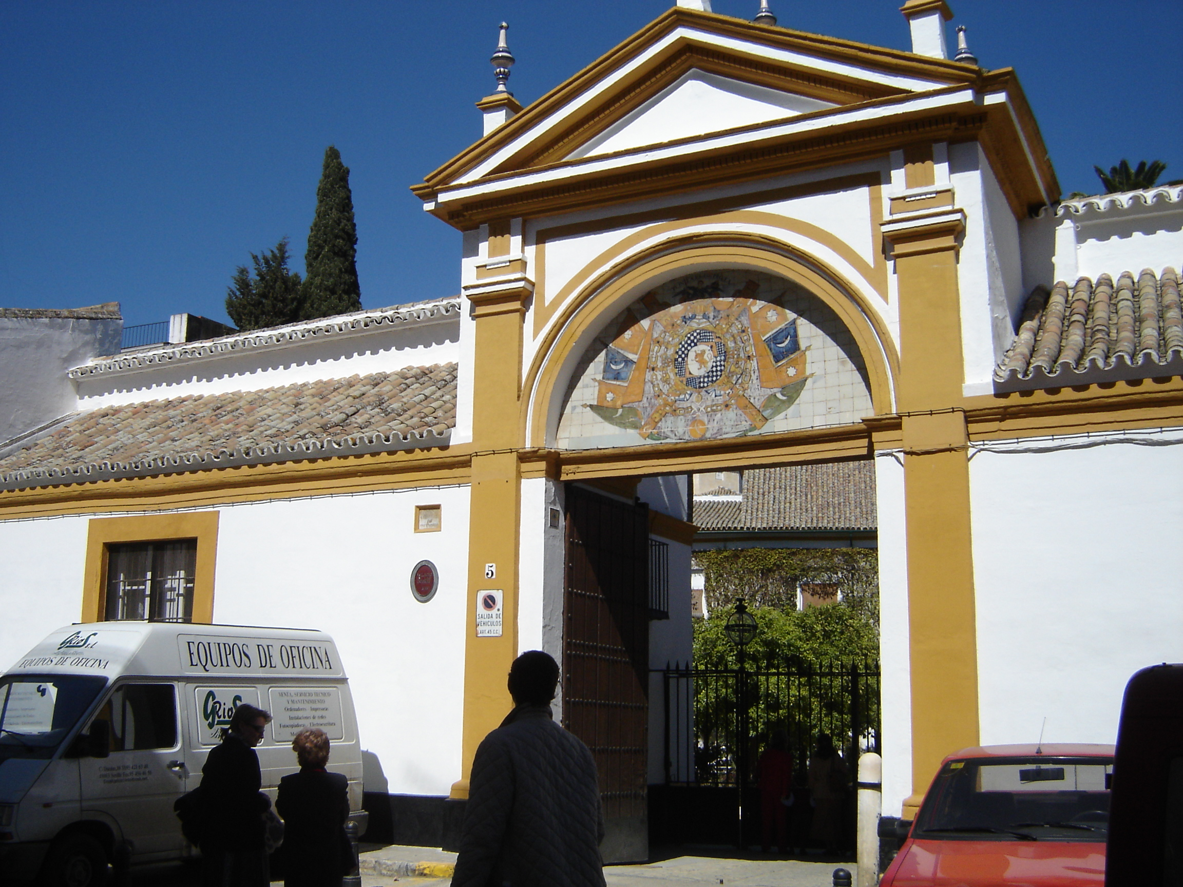 Palacio de las Dueñas (Sevilla). Puerta de entrada. Realización propia.